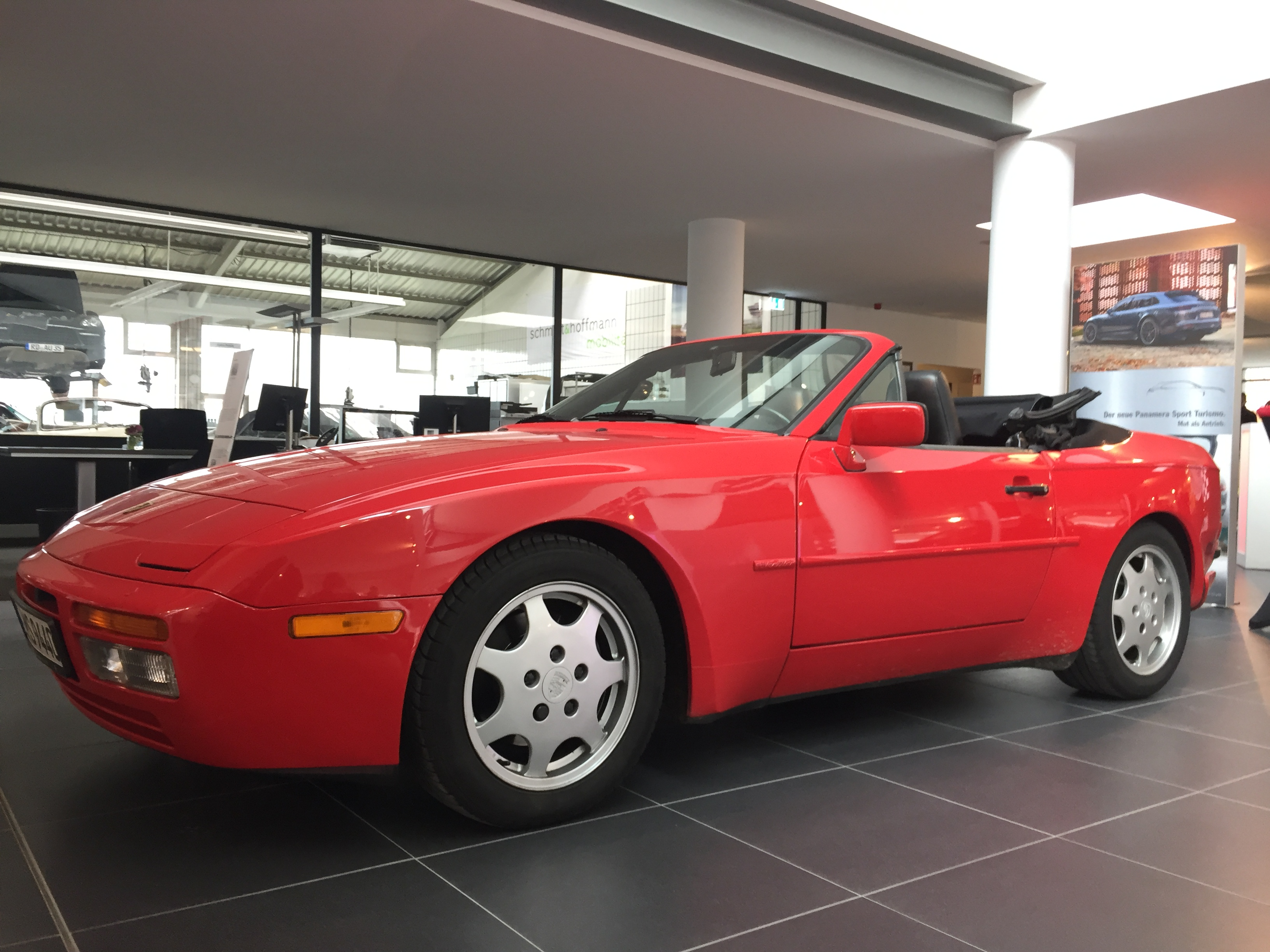 Porsche 944 S2 Cabriolet offen